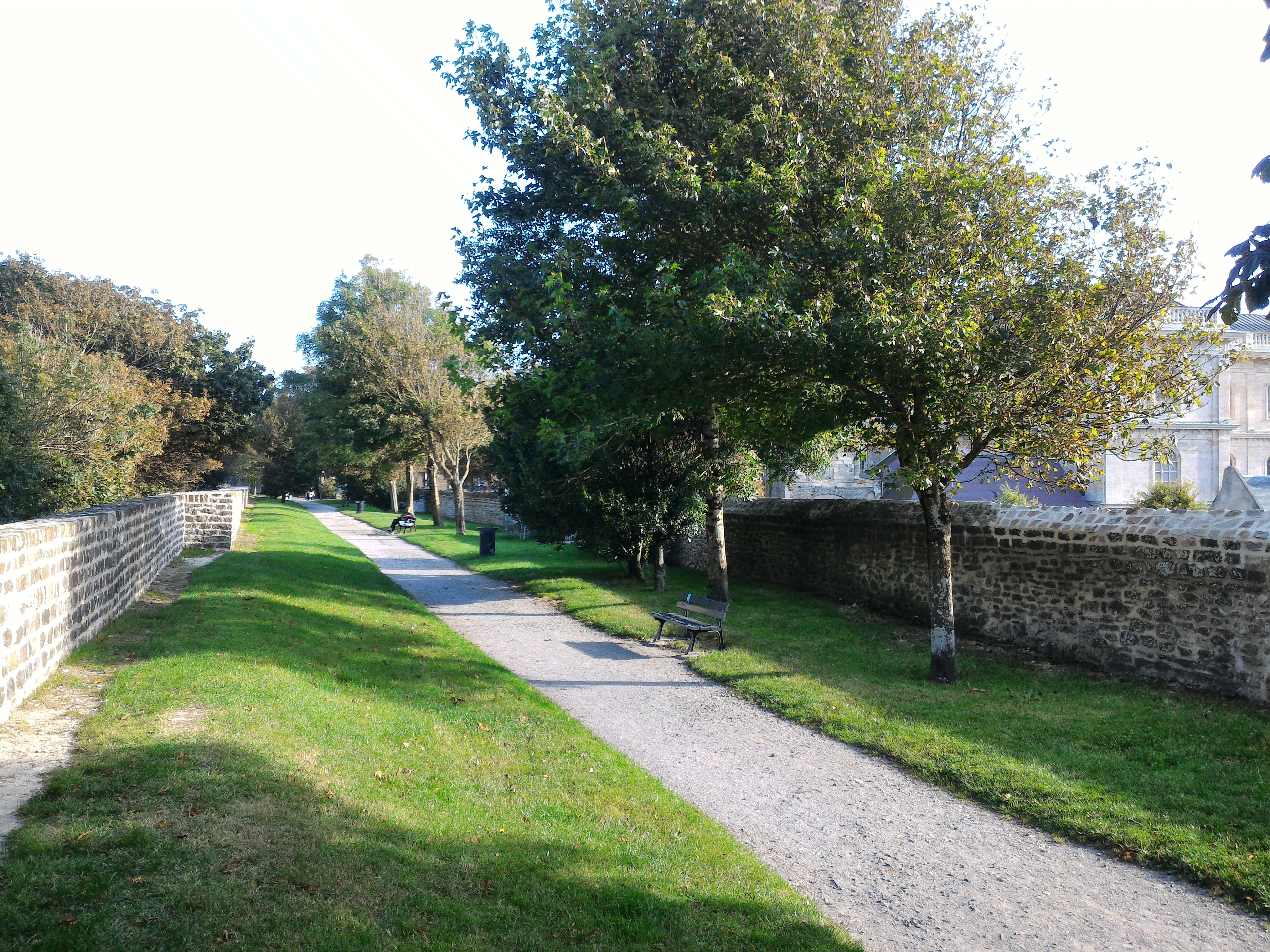 Promenade des remparts de Boulogne-sur-Mer (Pas-de-Calais)